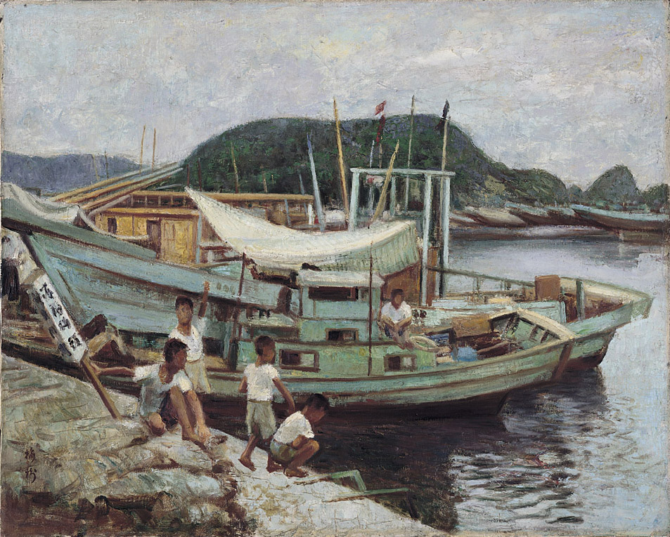 李梅樹作品：(蘇澳漁港)，(1963年)，(油彩 畫布)。船、小孩、山丘，構成了此作的主要內容。這是台灣典型的漁港風光。水面波光嶙峋，船的倒影表現水面之美。船上的桅桿，突出於山丘的稜線，活化了整個畫面。